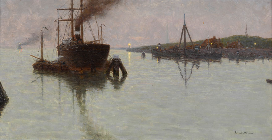 Heimes, Heinrich (1855 Mayen - 1933 Düsseldorf): Abendidyll. Signiert. Öl/Lwd., 60 x 114 cm